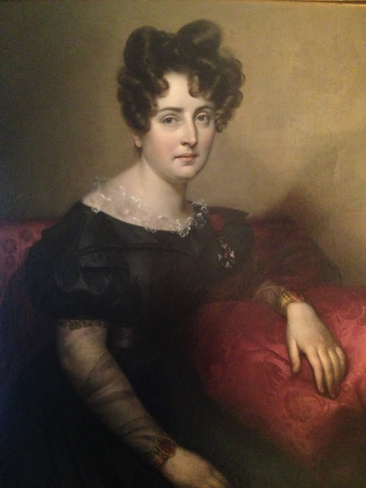 Portrait de Cora Millet-Robinet par Hippolyte Bruyères